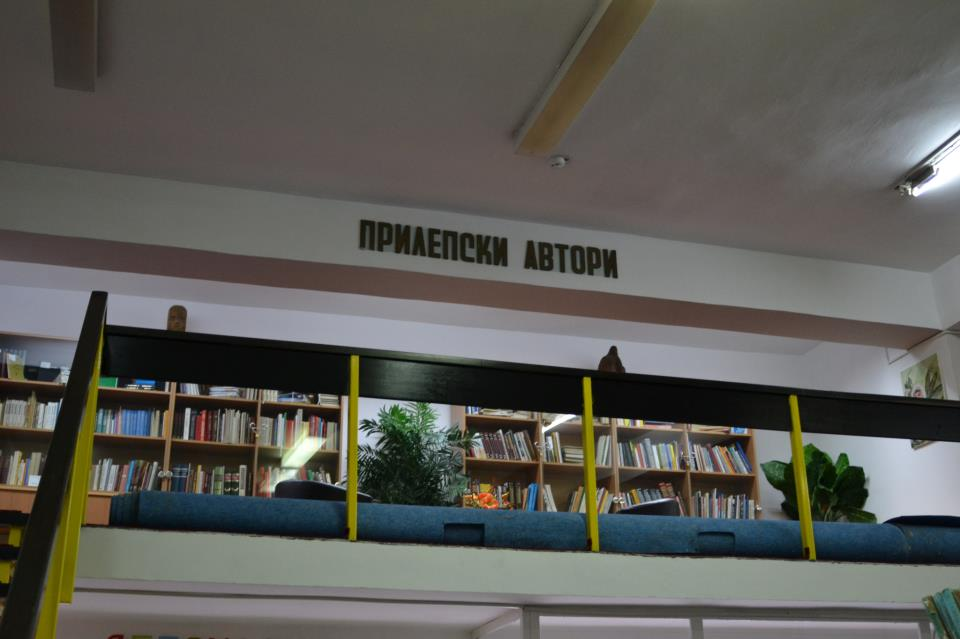 Прилепски автори